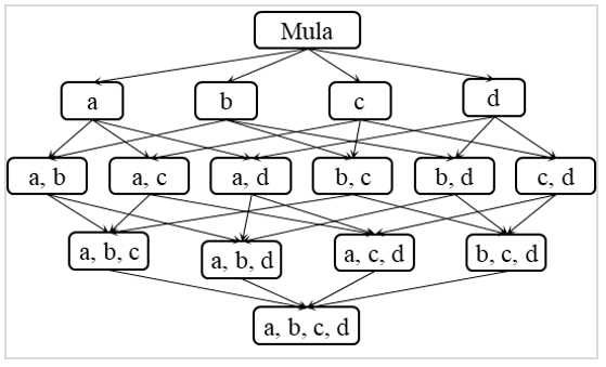 Proses janaan subset menggunakan strategi carian menyeluruh